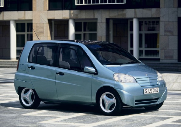 Bildbeschreibung: Studie A 93 Quelle: Mediaseite der DaimlerChryslerAG Genehmigung: Gern können Sie für Ihre Tätigkeit für die Wikipedia Inhalte der DaimlerChrysler Medienseiten verwenden. Dazu erkennen wir die Bedingungen nach GNU-FDL an. Das Angebot bezieht sich auch auf die vorhandenen Bilder.(Dr.Josef Ernst, Communications, DaimlerChrysler AG)